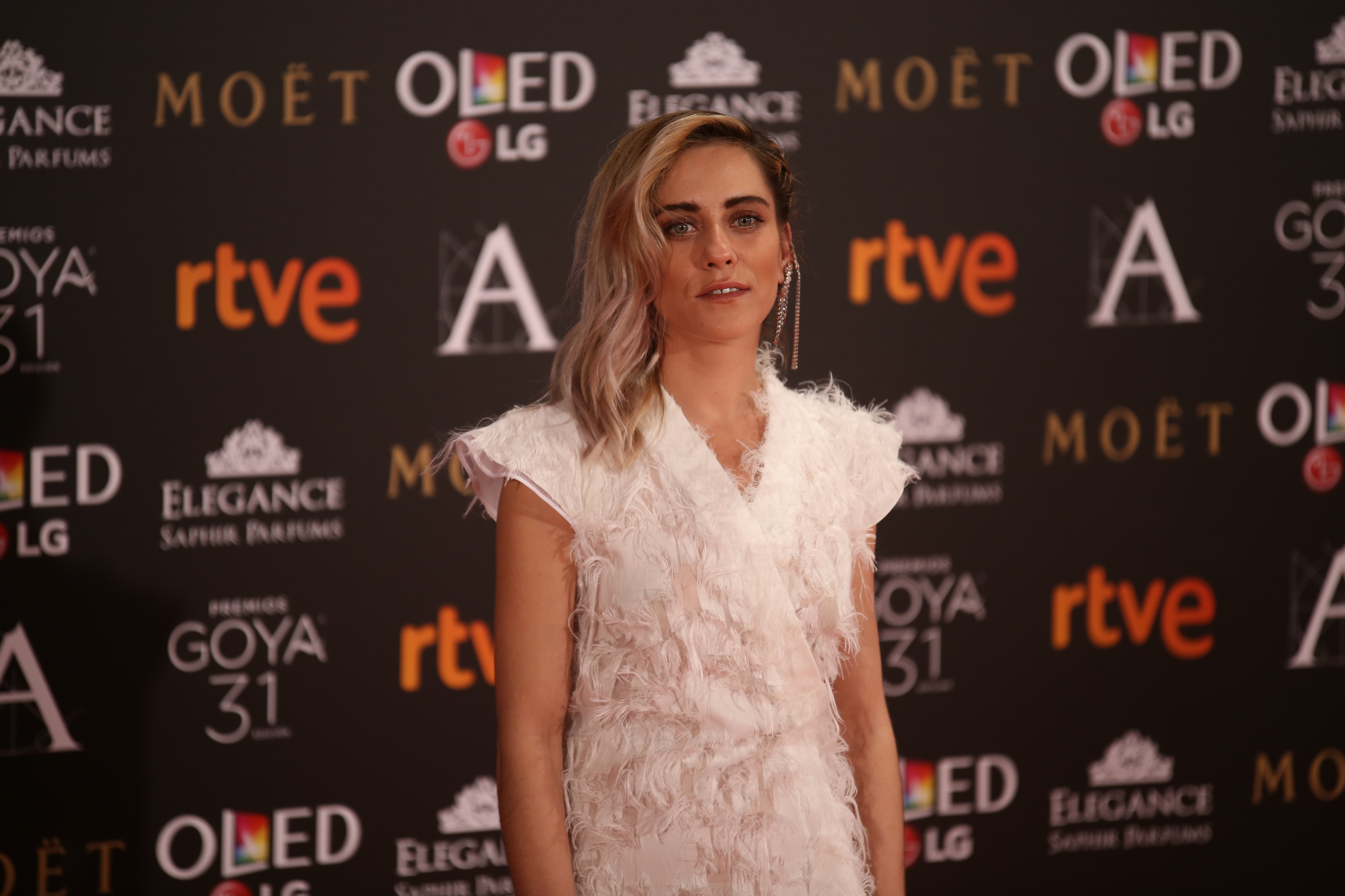 María León en los Premios Goya 2017. See also category: María León.